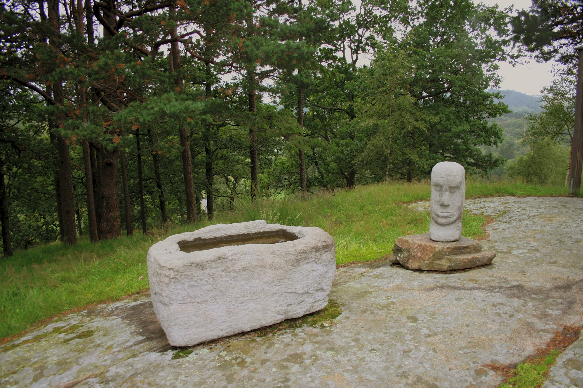 Rosslandguden, Opferplatz, Gemeinde SokndalNorsk bokmål: Rosslandguden, Sokndal kommune